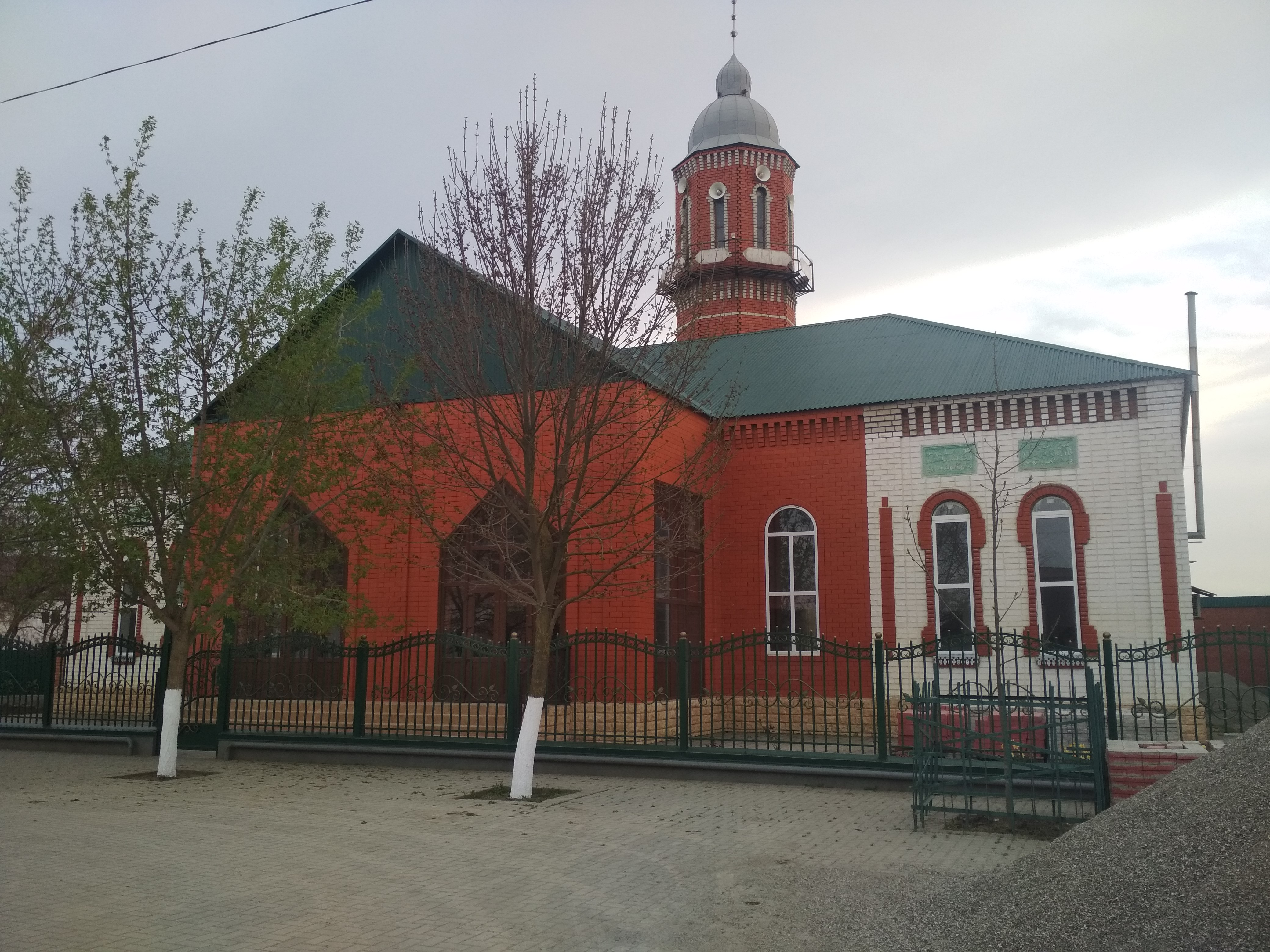 Нохчийн: Лаха Неврера маьждиг